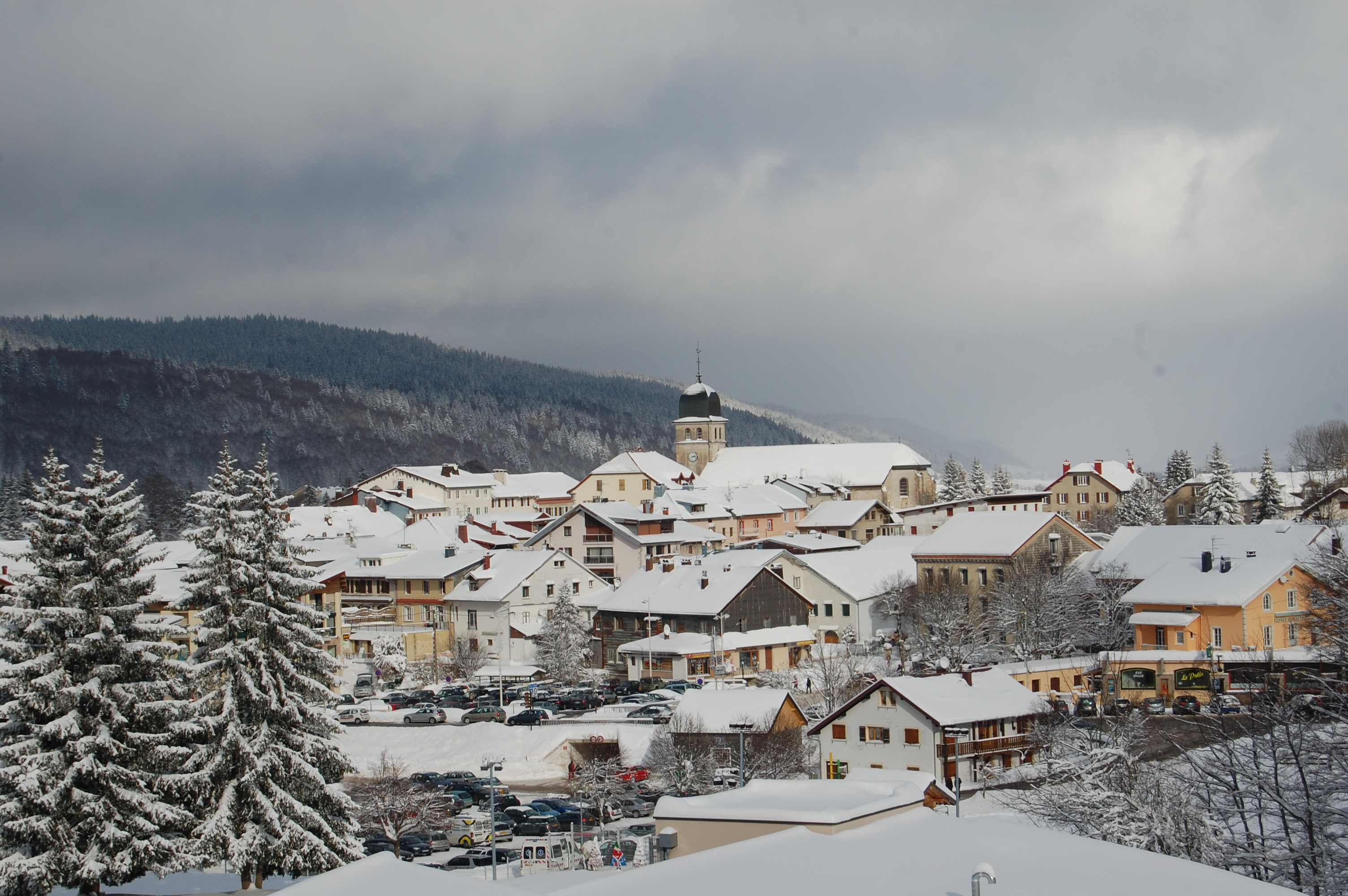 prise de vue depuis les remparts du fort en hiver